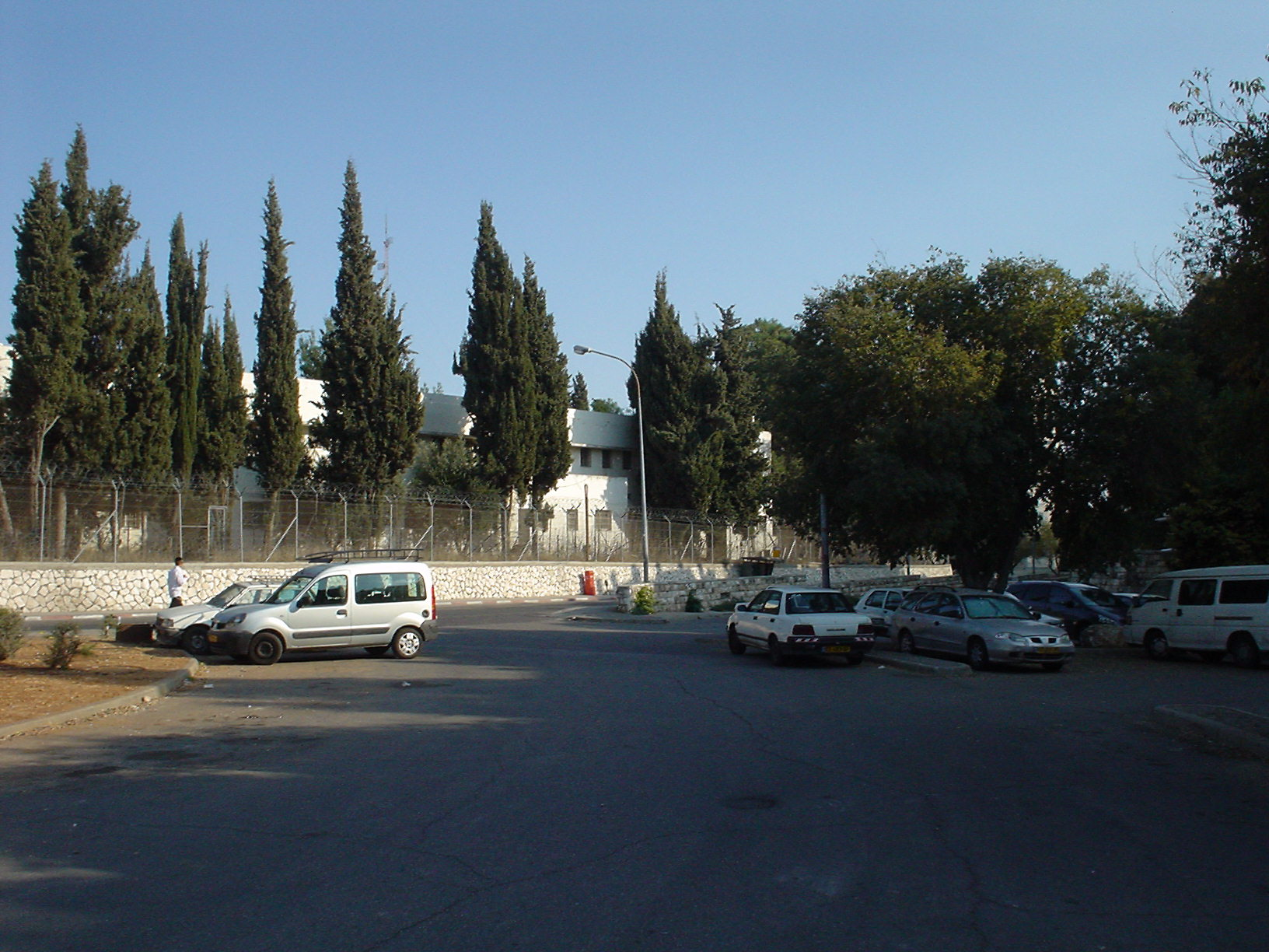 בית הספר לשוטרים, מבט ממעלות דפנה